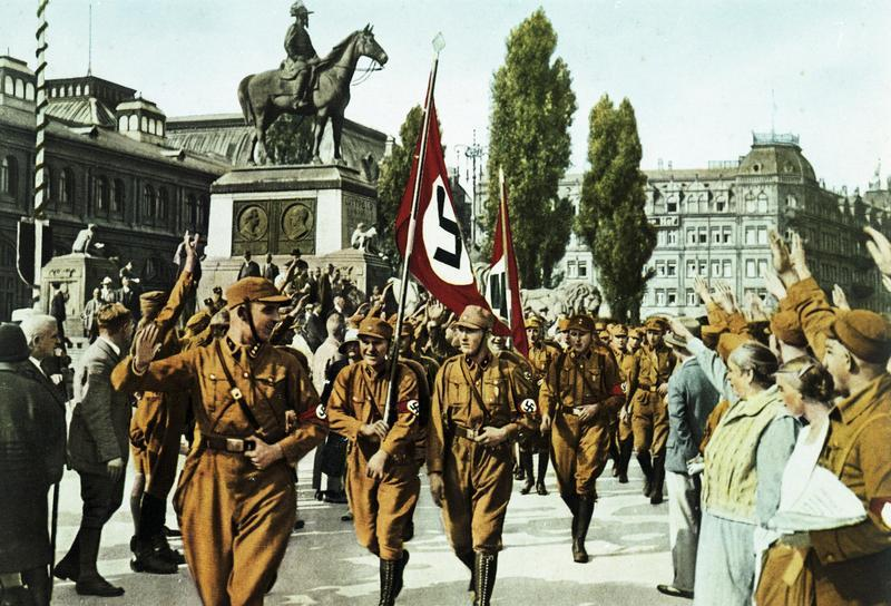 Nürnberg, Horst Wessel mit SA-Sturm Horst Wessel an der Spitze seines Sturmes in Nürnberg, 1929 Abgebildete Personen: Wessel, Horst: SA-Sturmführer, 1930 erschossen, Deutschland (GND 118631721)